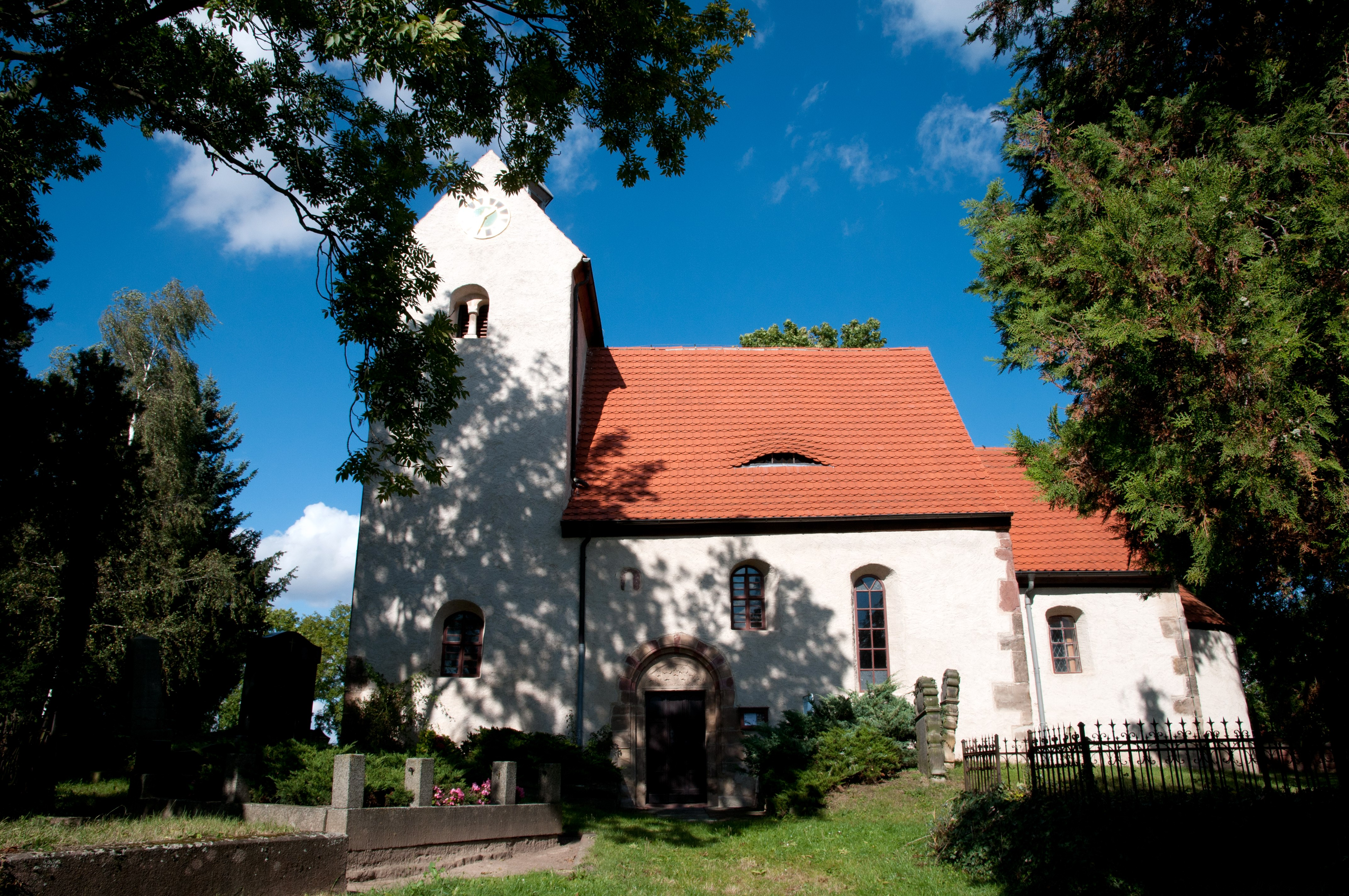 Neutz Kirche (Sachsen Anhalt, Deutschland)